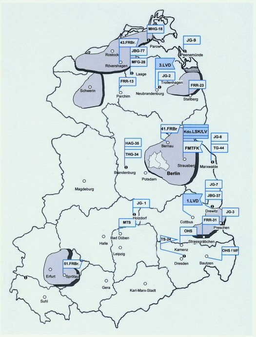 Dislozierung der Luftverteidigungsdivisionen, Flieger- und Raketenbasen sowie unterstützende Kräfte